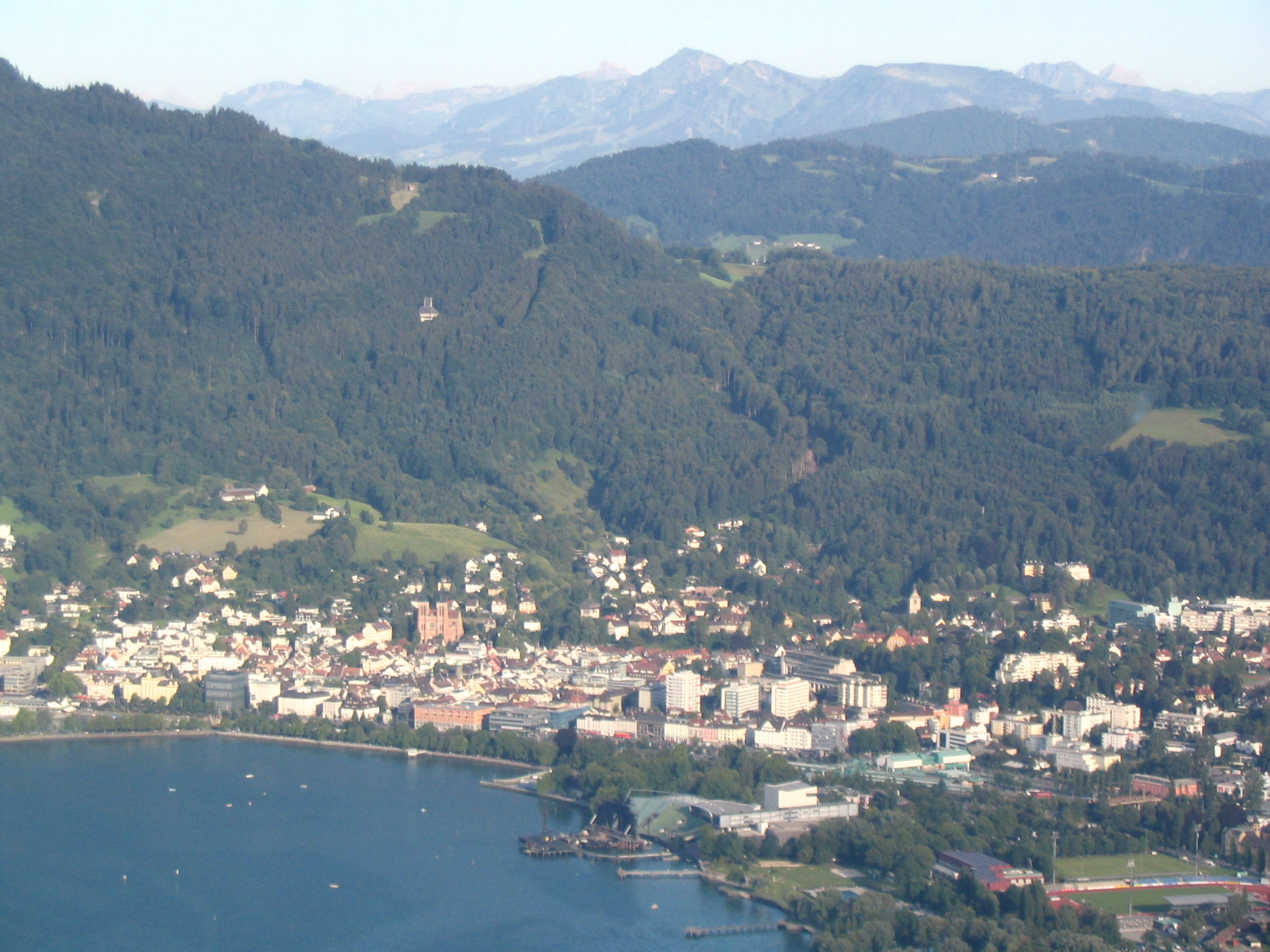 Bregenz am Bodensee